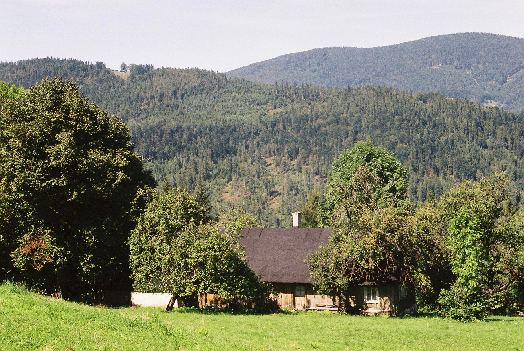 The Beskids, Beskid Śląski. Old hut on the slope of Skrzyczne. Beskidy - Beskid Śląski. Chata na stoku Skrzycznego. Author: Pko Date: 3 Sep 2005